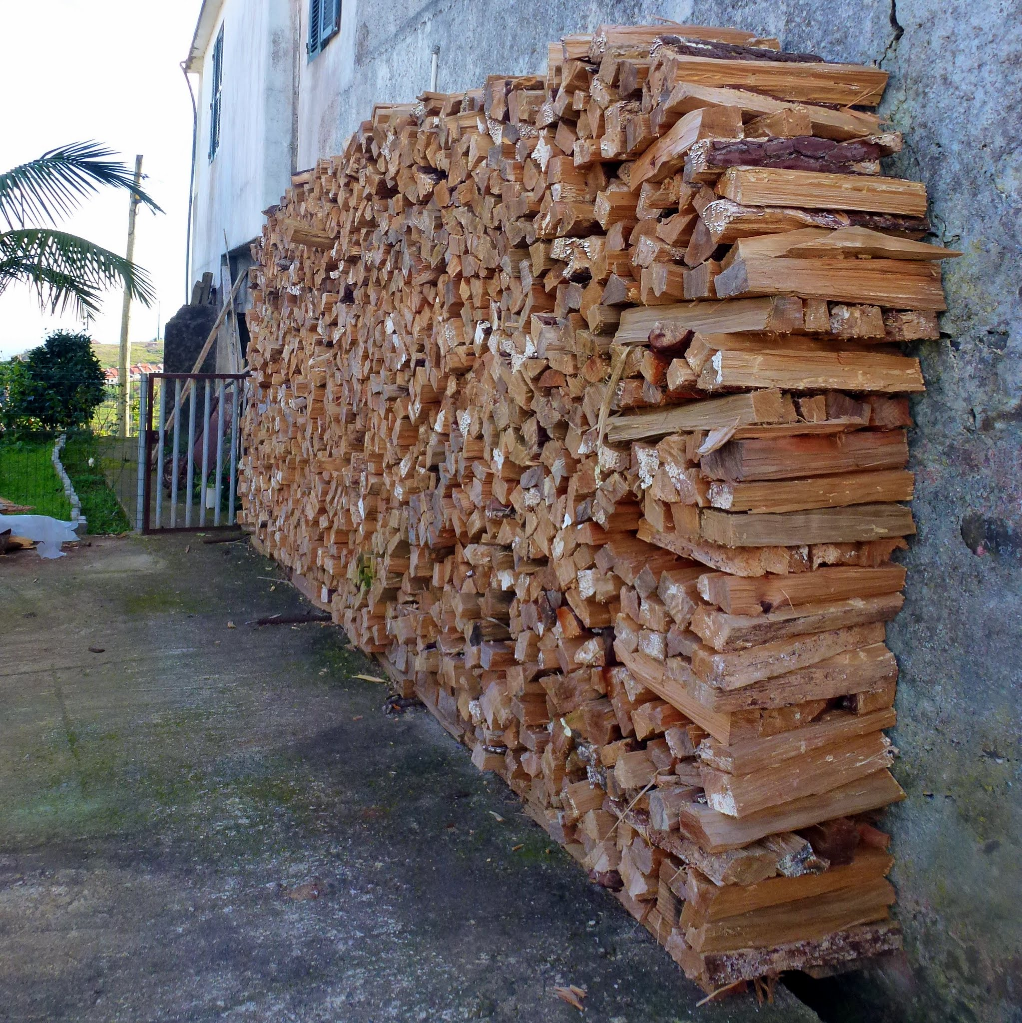 Madeira, Portugal